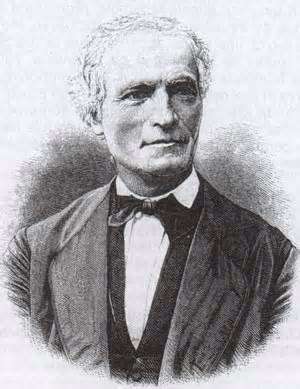 Jean-Hippolyte Michon (1806-1881), précurseur de la graphologie